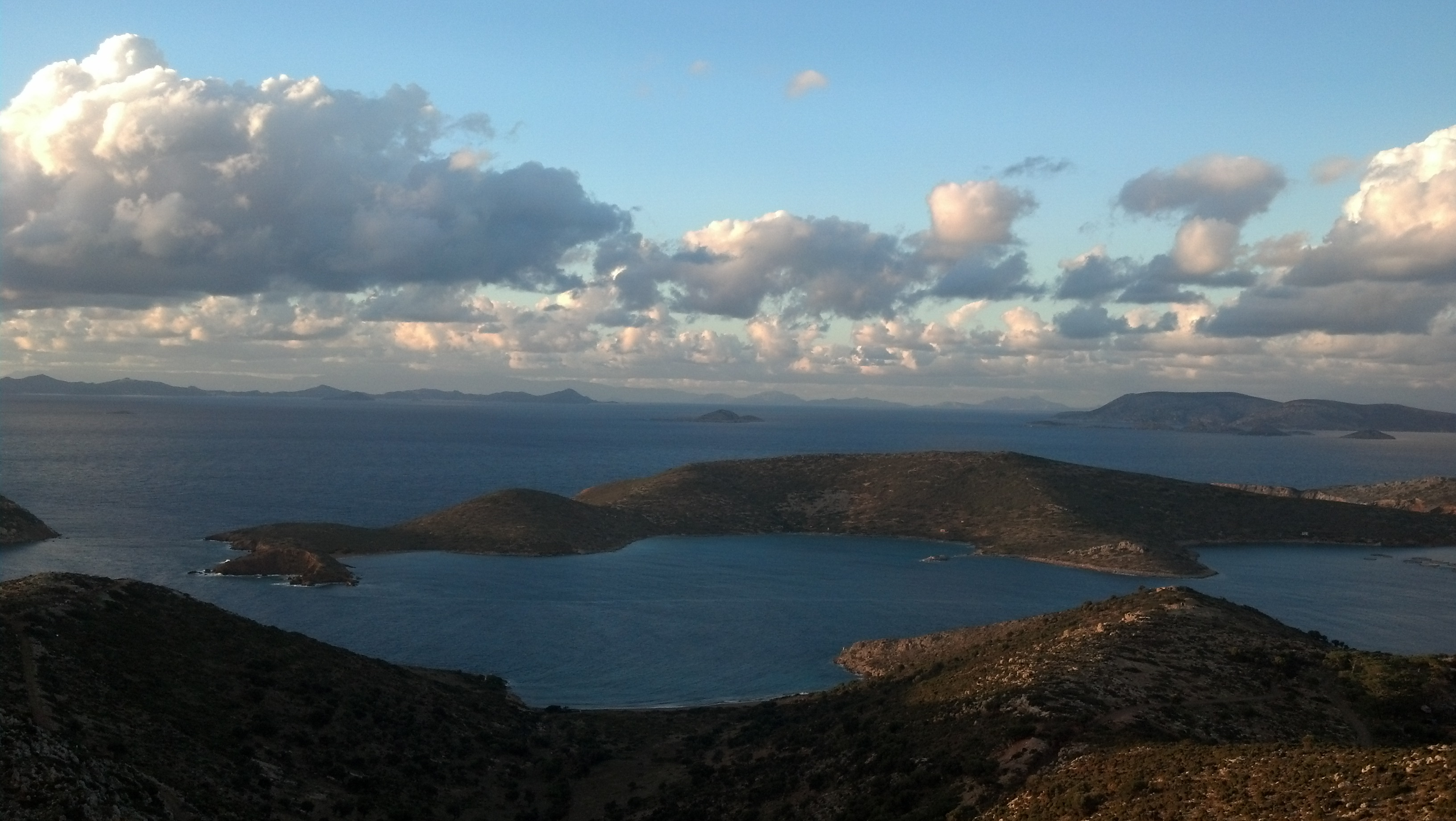 Το δυτικό τμήμα του νησιού Αρχάγγελος από την κορυφή Μάρκελος, Λέρος